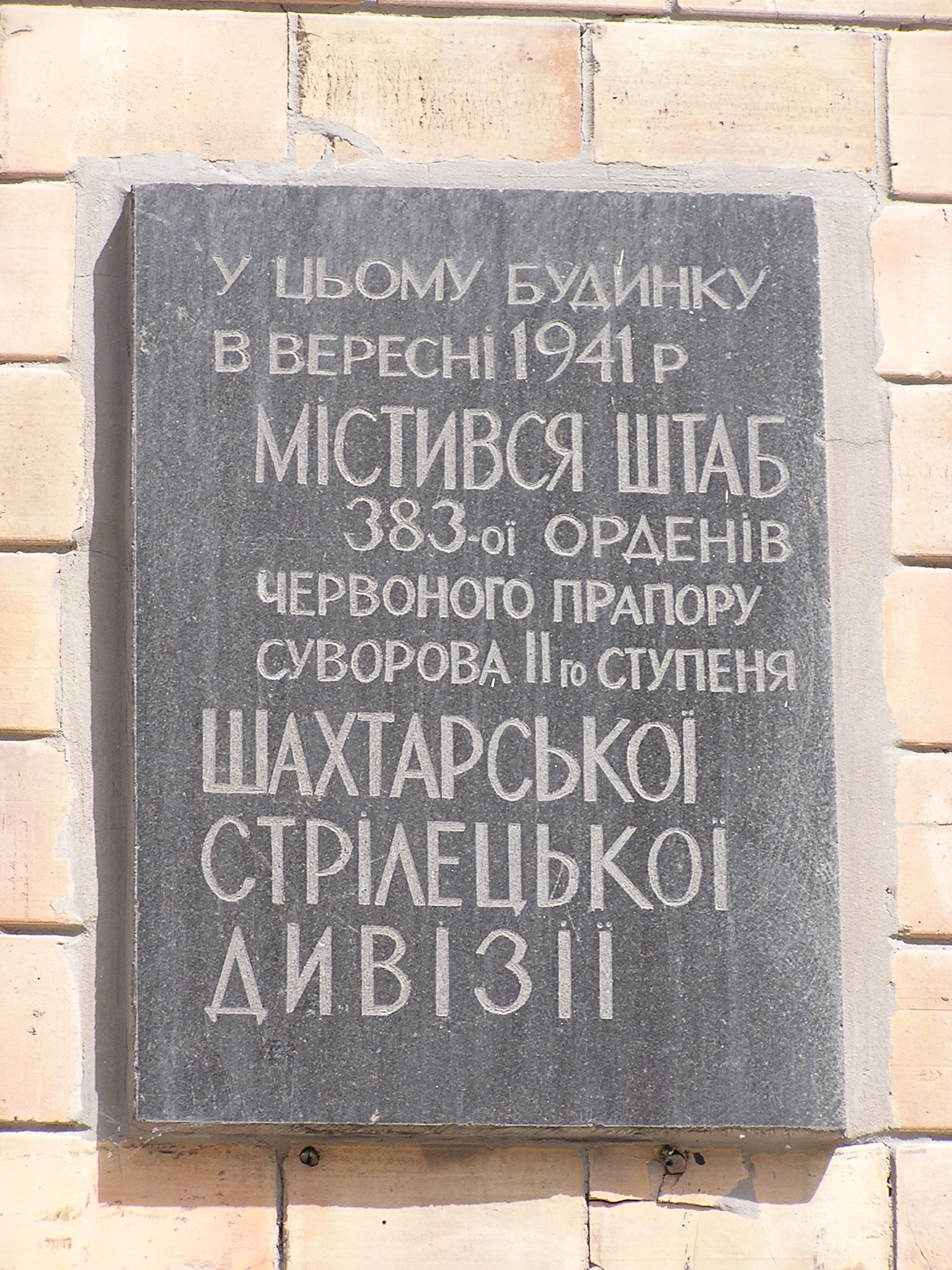 Мемориальная табличка в Донецке на здании, расположенном на площади Ленина, в котором размещался штаб дивизии в сентябре 1941 года